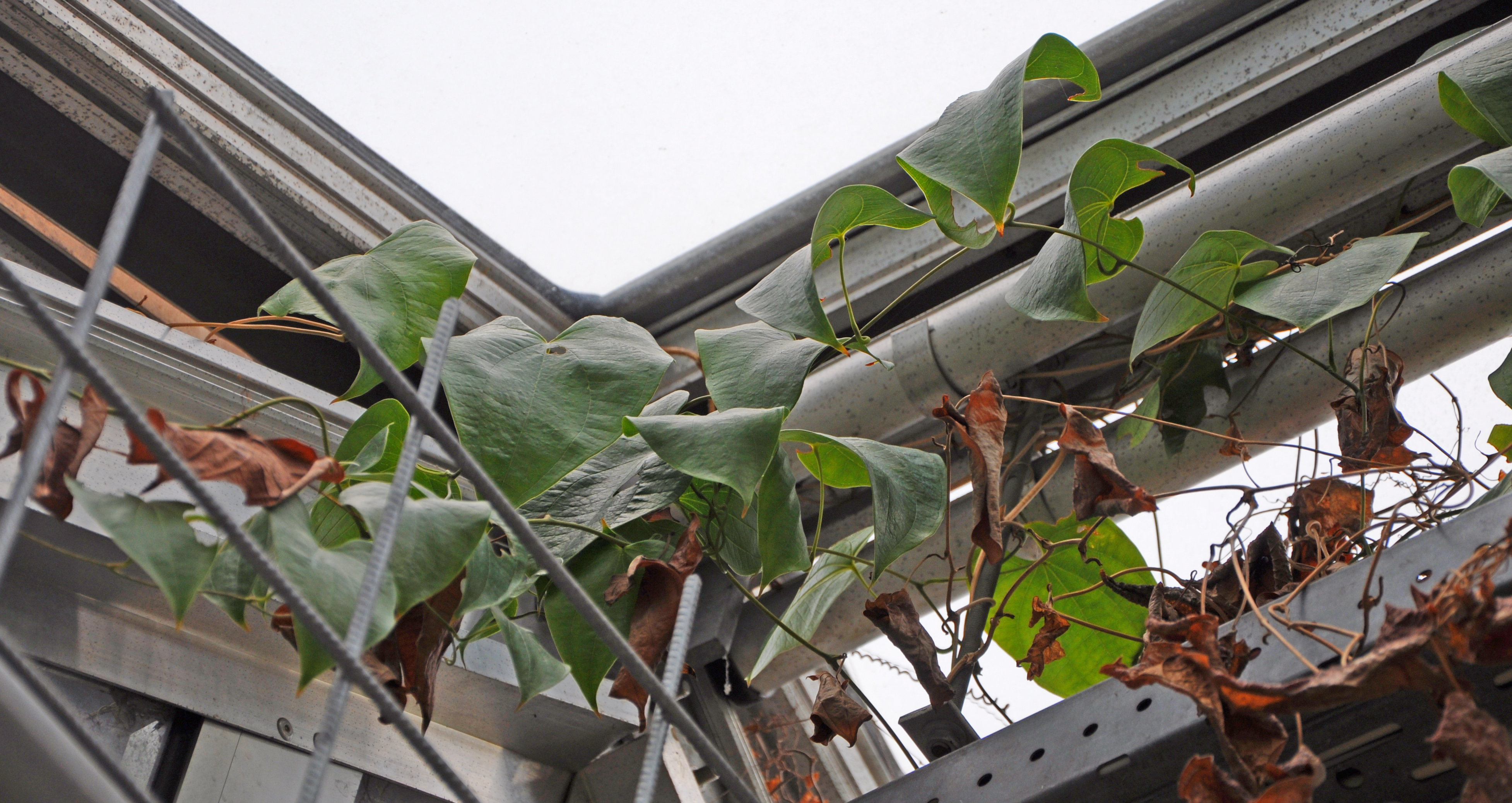 Dioscorea mexicana leaves